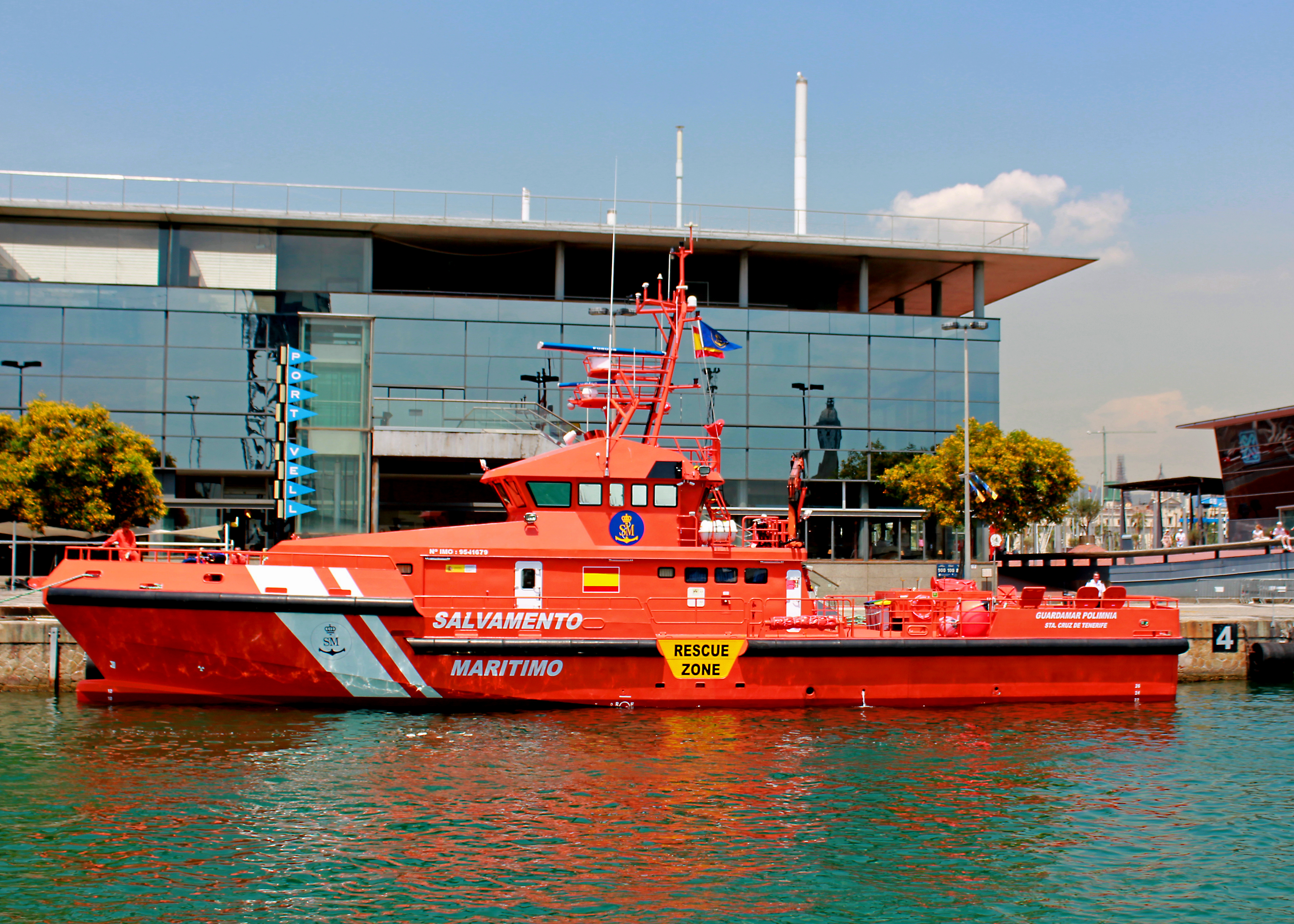 Barcelona maritime rescue